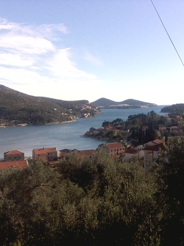 Zaton